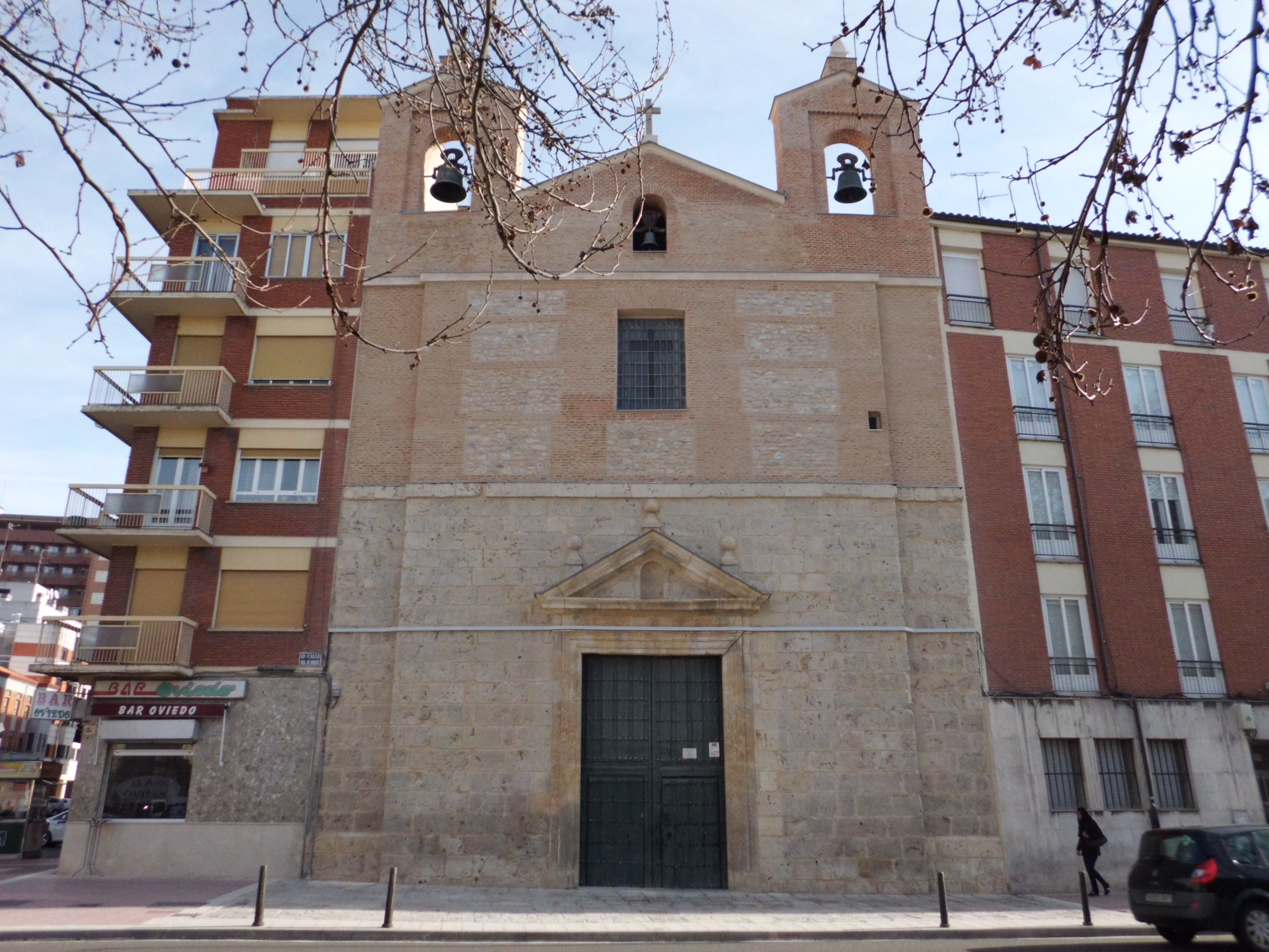 Fachada de la iglesia parroquial de San Pedro Apóstol, Valladolid (España). Restauración y limpieza recientes en enero de 2013.